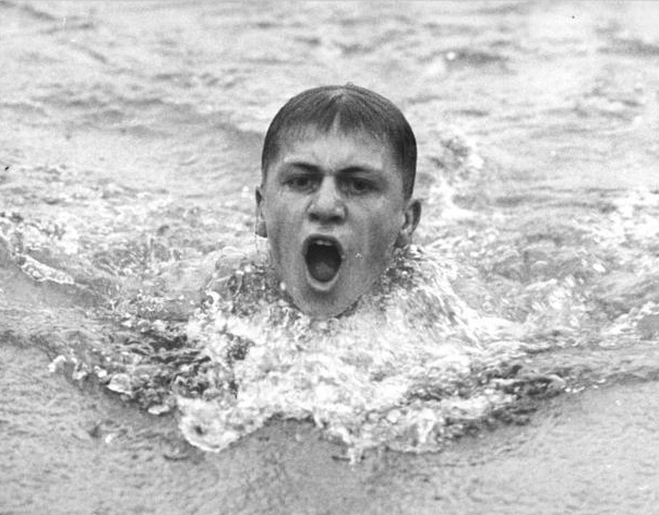 Matthias Pechmann Zentralbild Mittelstädt en-31-8-69 Berlin:Deutsche Meisterschaften der DDR im Sportschwimmen vom 28. bis 31.8.69 im Friesenstadion-Sieger über 400-m-Lagen wurde Matthias Pechmann von der DHfK Leipzig